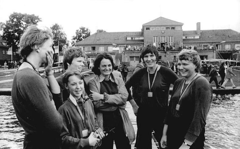 SC DHfK Leipzig, Vierer der Frauen ADN-ZB Reiche 21.7.74 Berlin-Grünau: DDR-Rudermeisterschaften- Neuer DDR-Meister im Vierer mit Steuermann der Frauen- Am zweiten Tag der DDR-Rudermeisterschaften (21.7.) belegte der Vierer mit Steuermann der Frauen des SC DHfK Leipzig mit Rosel Nitsche. Angelika Noack, Renate Schlenzig, Sabine Dähne und Steuermann Christa Kasneth, in der Zeit 3:54,40 den ersten Platz. Mitte, Hertha Weißig, Trainerin. (Weiteres siehe hierzu ADN-Meldg.)